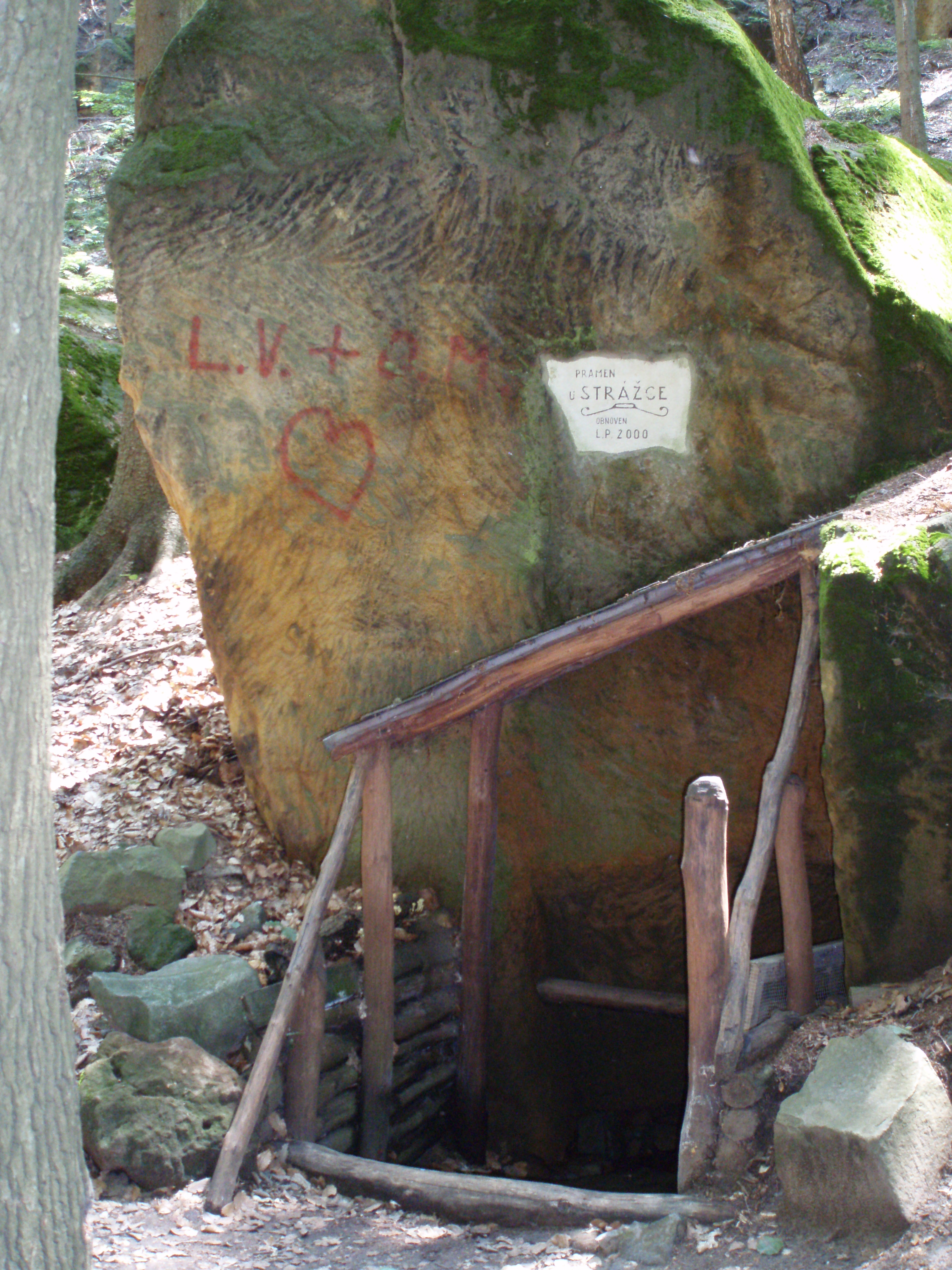 Česky: Pramen u cesty mezi Svojkovem a Modlivým dolem